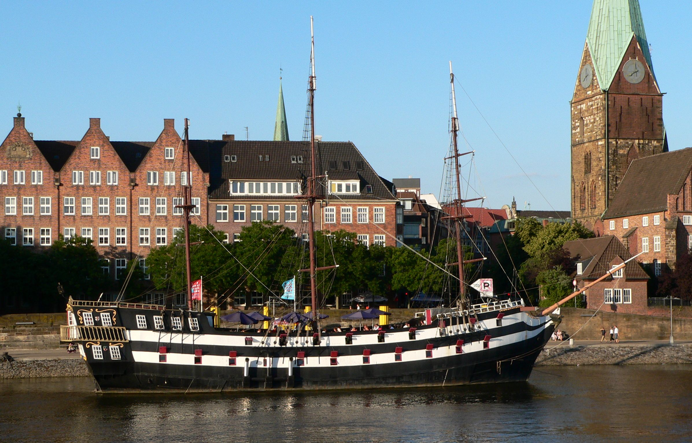 Fregatte „Admiral Nelson“ am Schlachte-Anleger in Bremen, Nachbau einer 40-Kanonen-Fregatte, Restaurantschiff